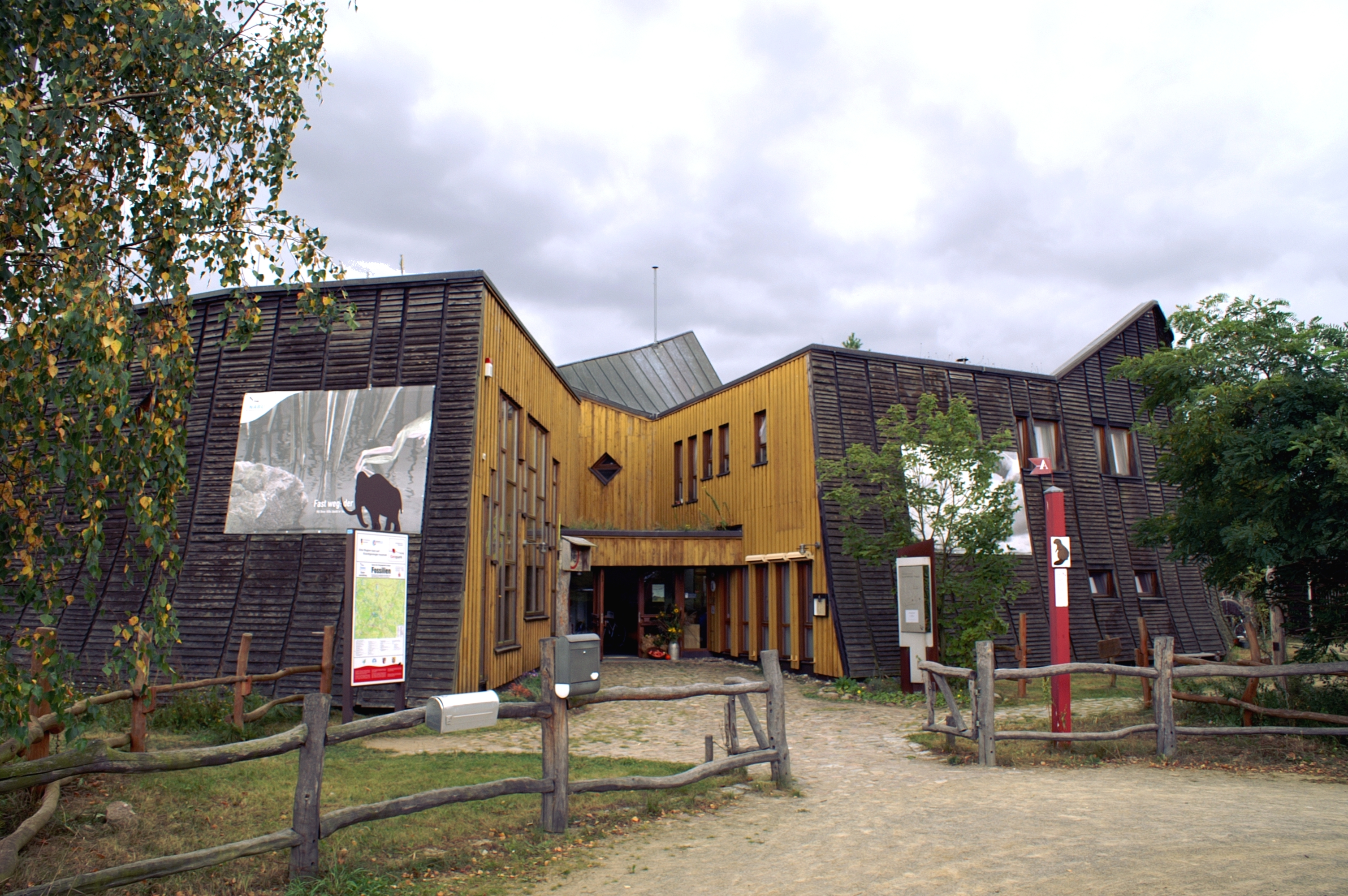 Das Informationszentrum Blumberger Mühle - Haupteingang